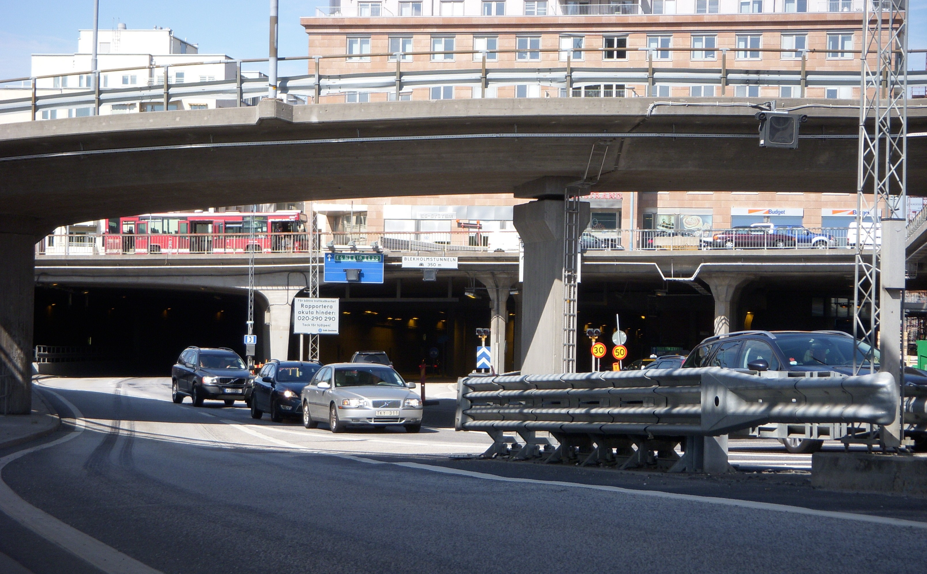 Blekholmstunneln i Stockholm, vy mot södra tunnelöppningen